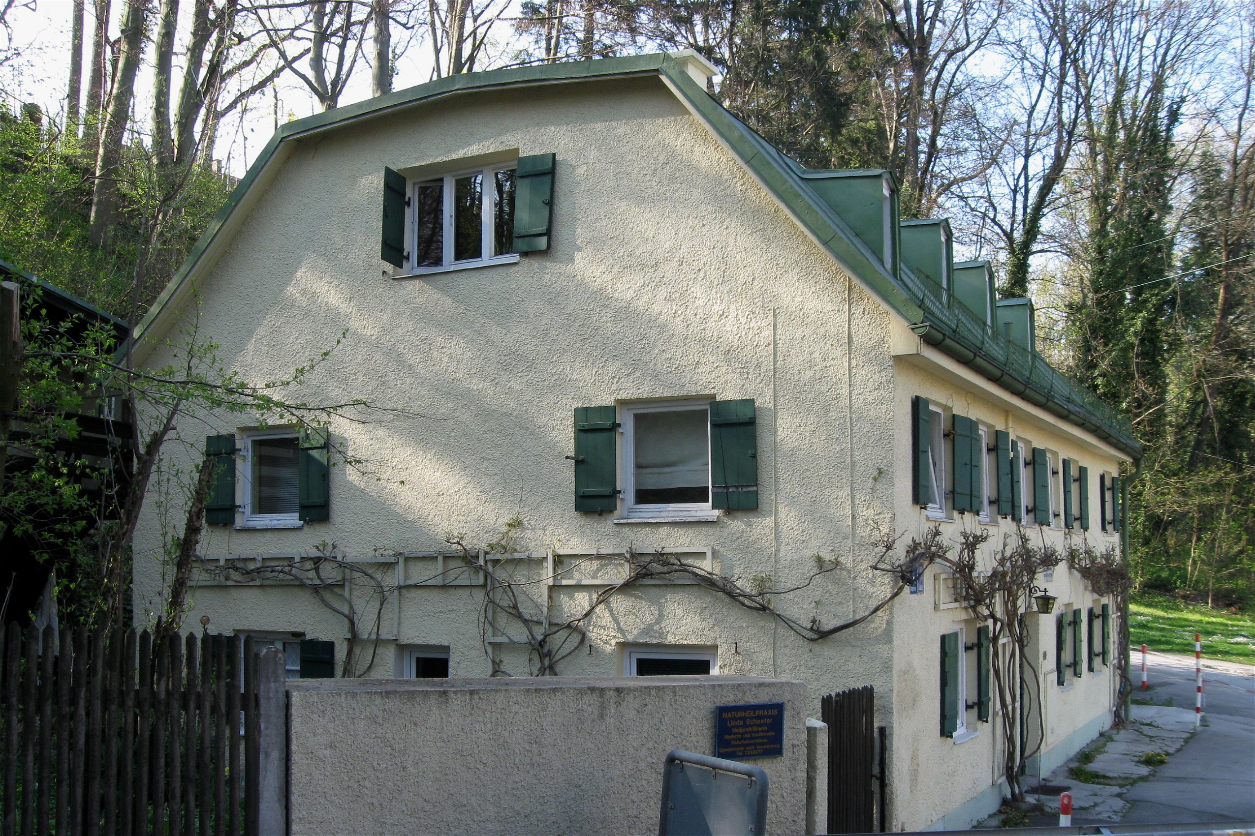 Kreppeberg 2; Kleinhaus, mit Blechdach und hohen Gauben, im Kern 18. Jh.. München